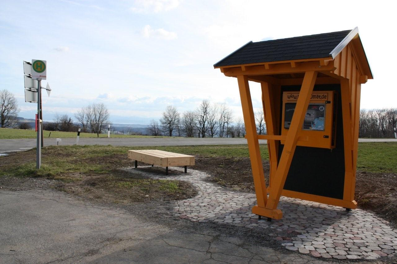 Bergstation StoppOmaz Höchsten